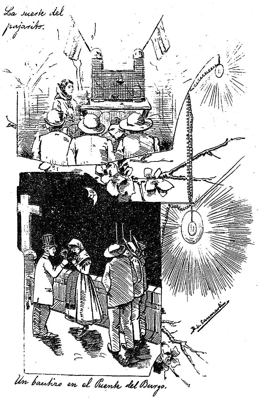 Extracto de Literatura semanario dosimétrico ilustrado. Año I. Número 5.